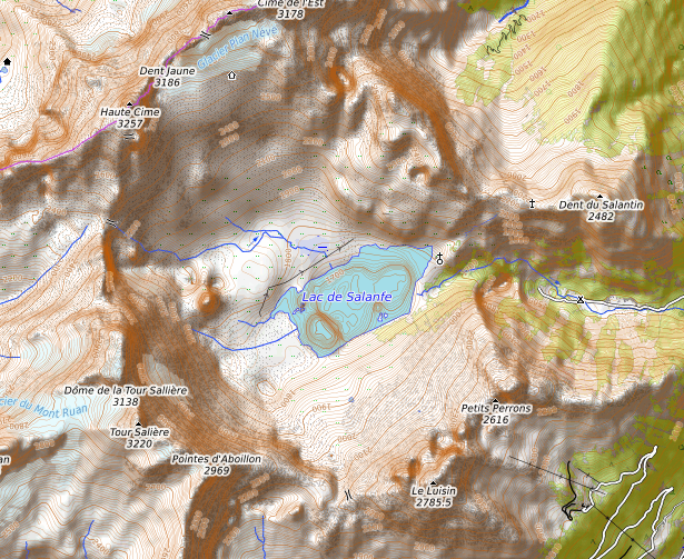 carte réalisée sur umap This map may be incomplete, and may contain errors. Don't rely solely on it for navigation.